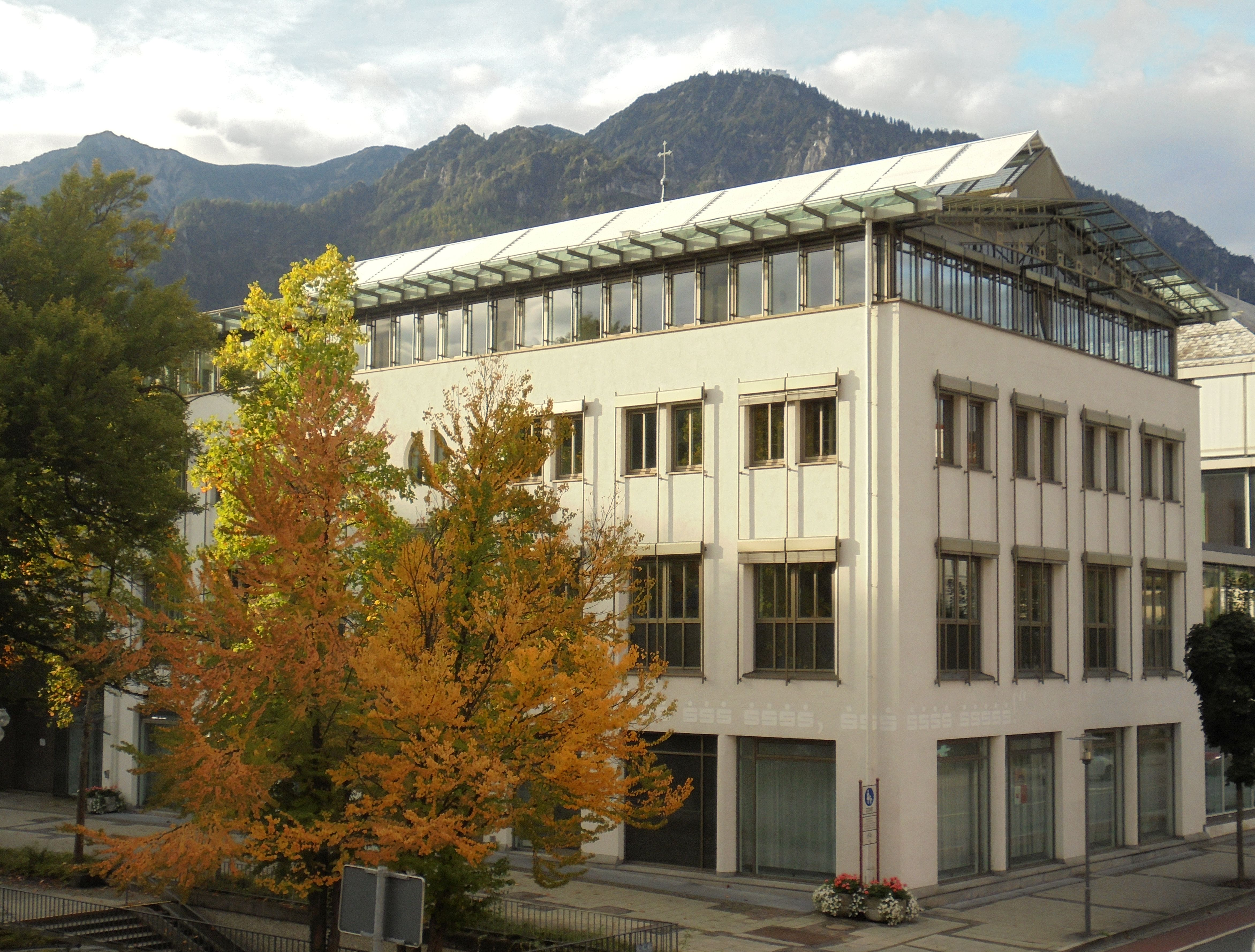 Blick vom Kurgastzentrum auf das Hauptgebäude. Im Hintergrund das Lattengebirge mit dem Predigtstuhl.